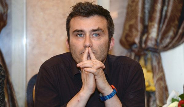 Sergio Basso in una conferenza stampa presso l'Ambasciata Italiana nella Federazione Russa, in occasione della premiere del suo film "Le avventure di giovani italiani " MIFF . Catherine Chesnokov / RIA Novosti